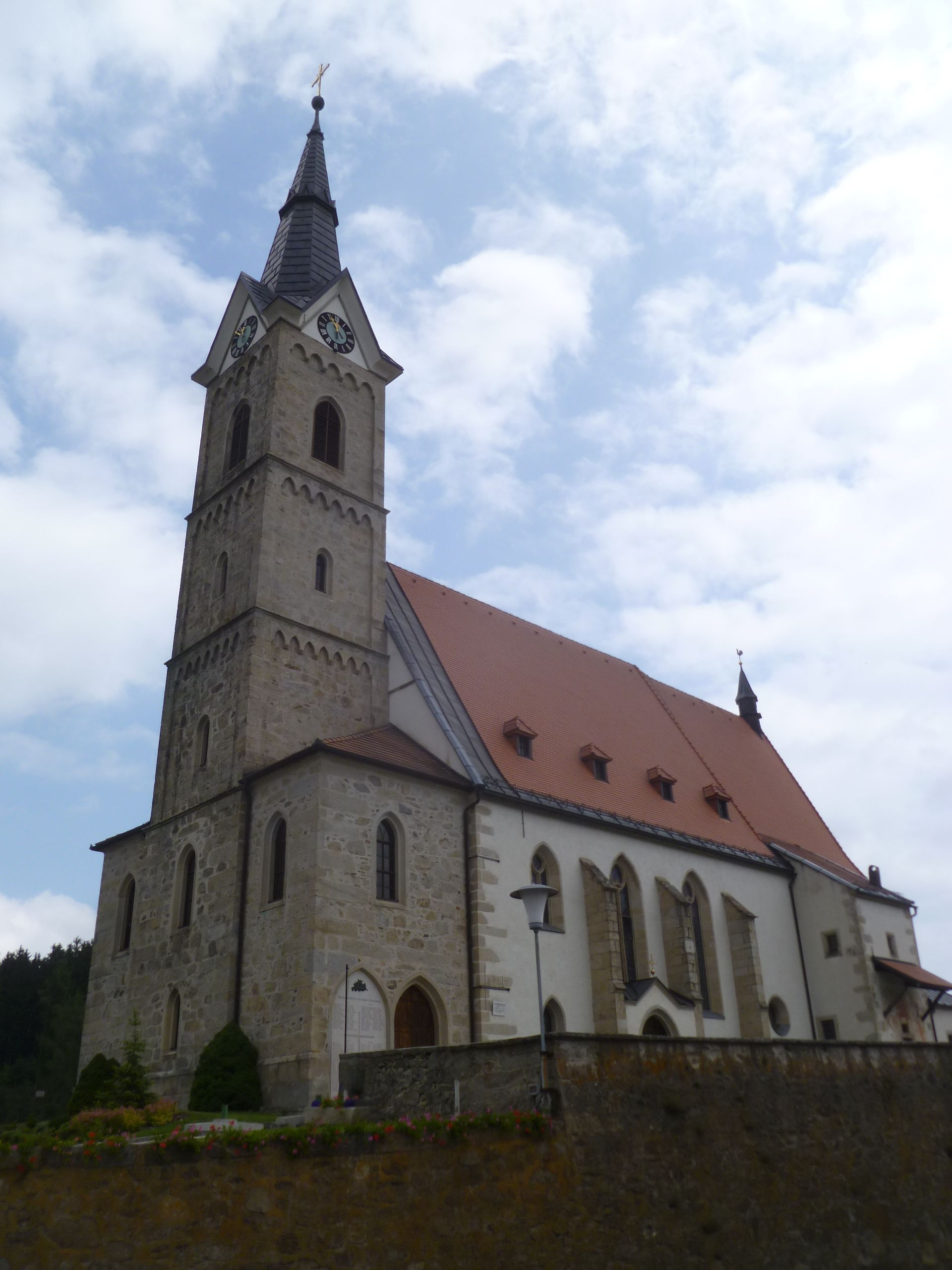 Kath. Pfarrkirche hl. Johannes der Täufer